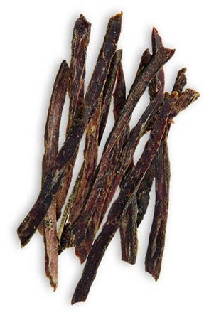 Reepjes beef jerky afbeelding eigendom van eigen bedrijfje